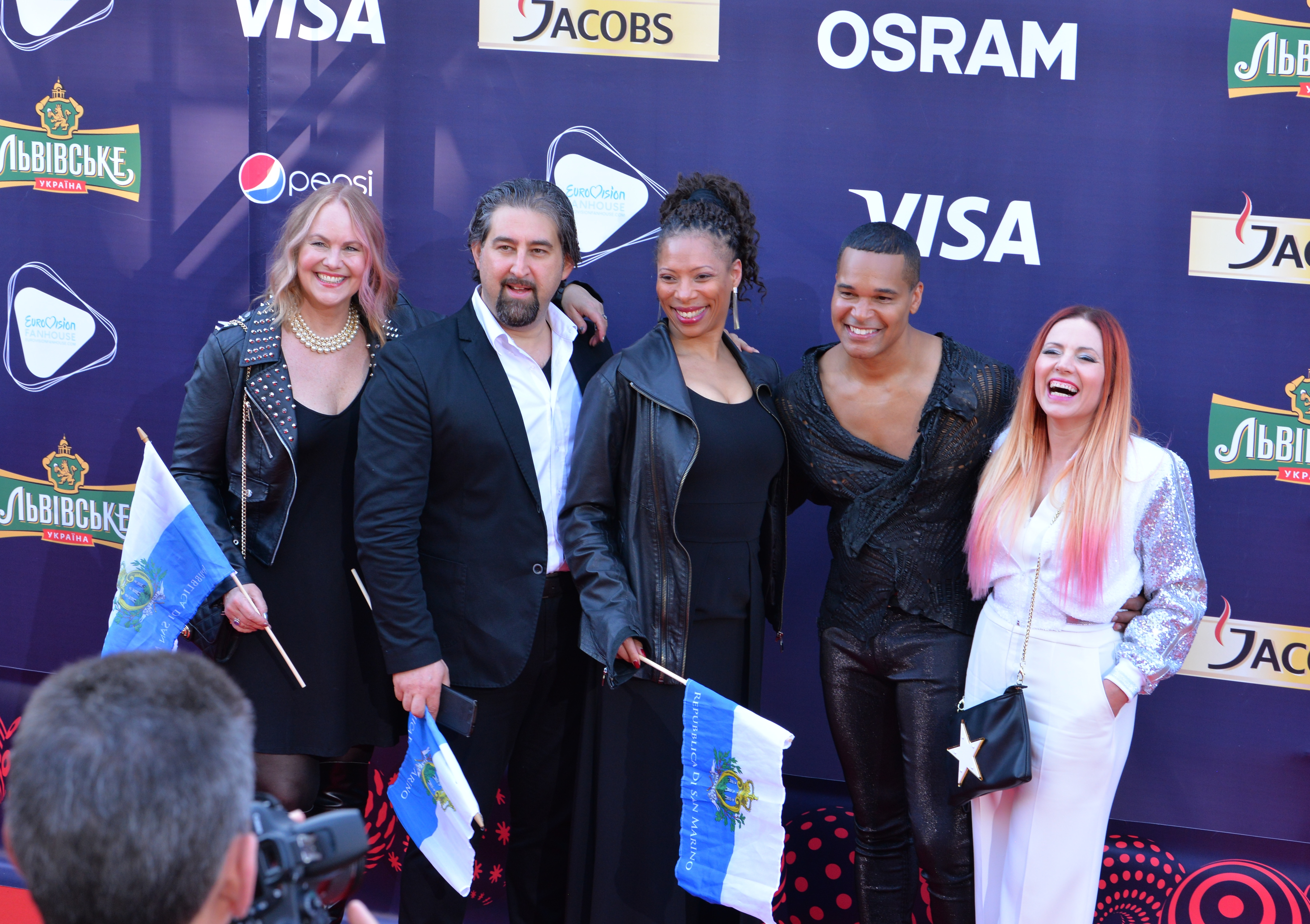 Представники Сан Маріно Валентина Монетта та Джиммі Вілсон з командою підтримки на церемонії відкриття пісенного конкурсу Євробачення 2017 у Києві